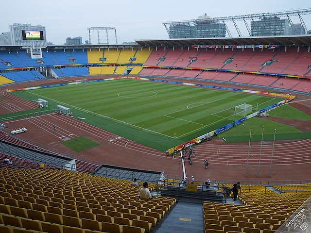 Workers' Stadium